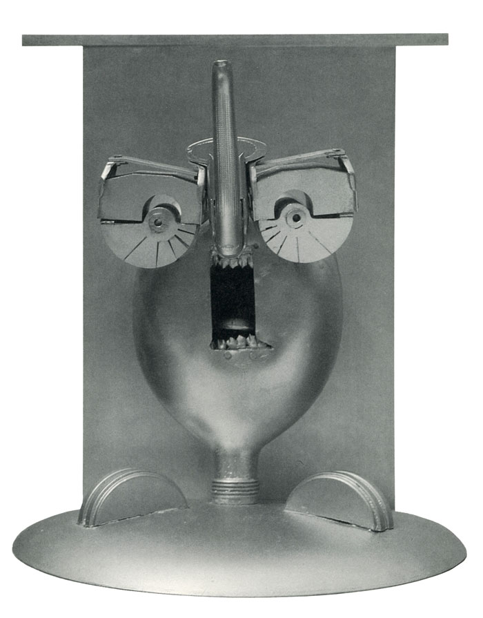 Foto des Schrottobjektes "Ma(h)nuel, 1977/1989“ von Irma Hünerfauth. verchromt 33x28x22 cm. Ort: München